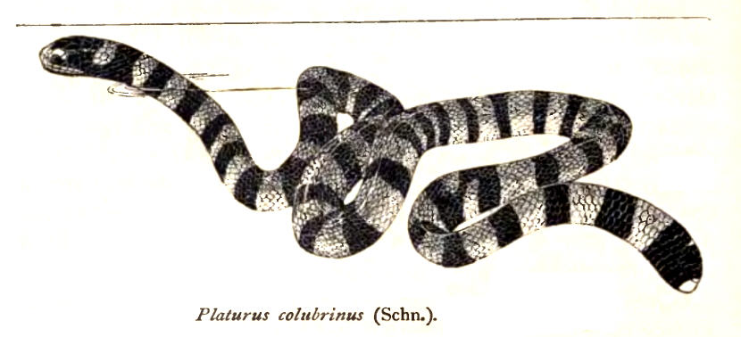 Platurus colubrinus , Colubrine sea snake